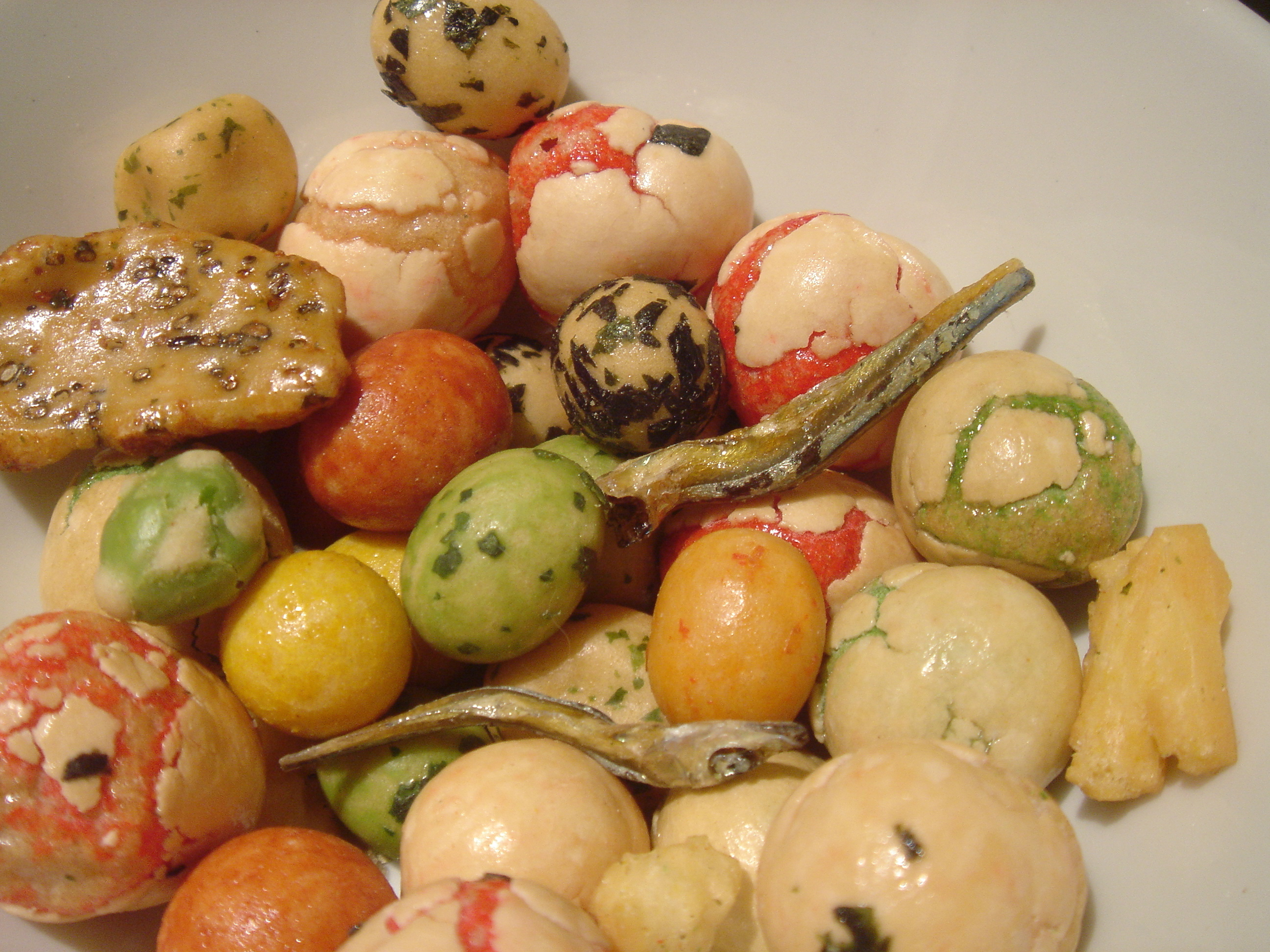 Peanut Arare